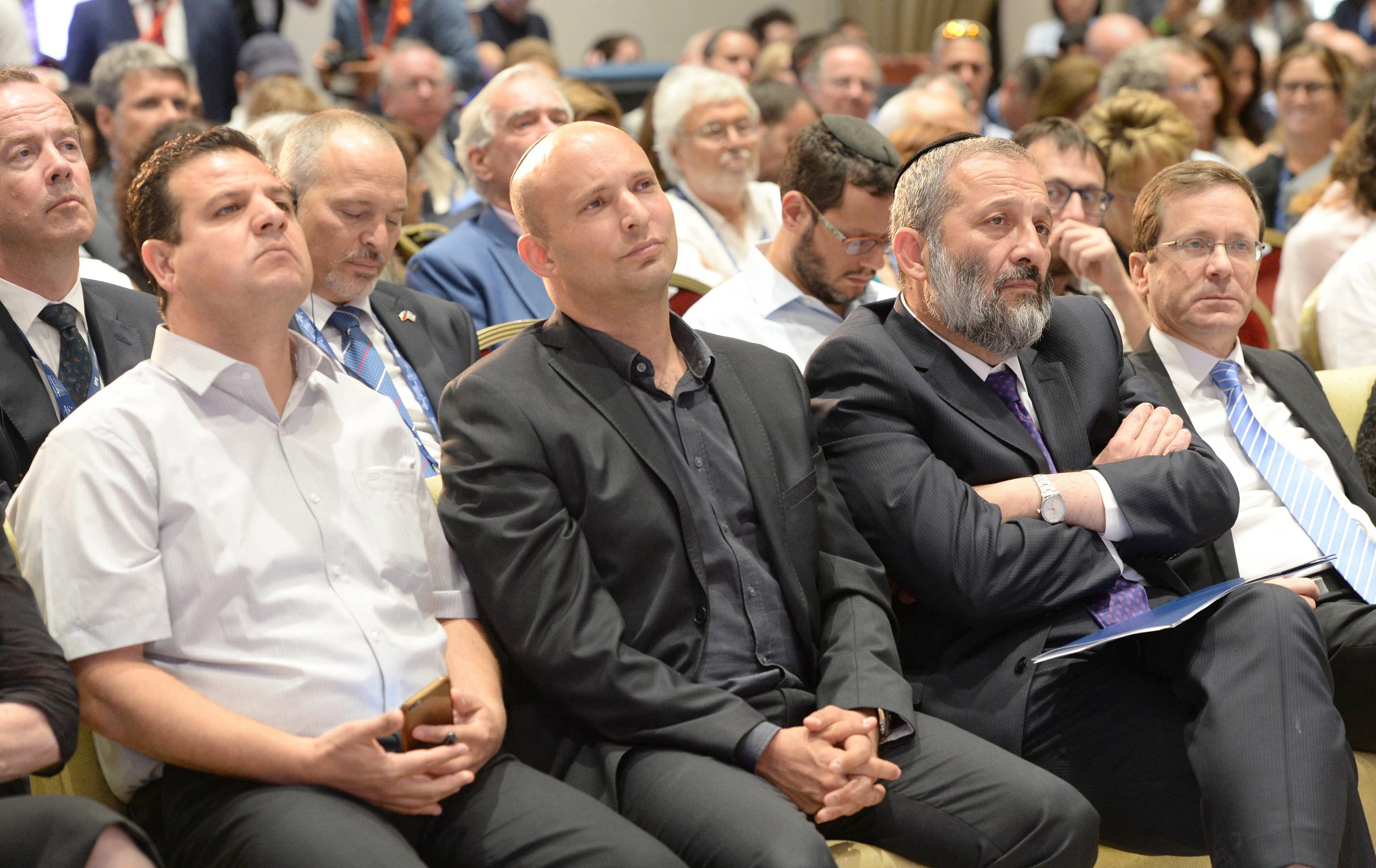 נשיא מדינת ישראל ראובן ריבלין נואם בכנס הרצליה ביום הראשון שהתקיים בבית הנשיא תחת הכותרת תקווה ישראלית משותפת- חזון או חלום. בתמונה מימין לשמאל: יצחק הרצוג, אריה דרעי, , נפתלי בנט ואיימן עודה